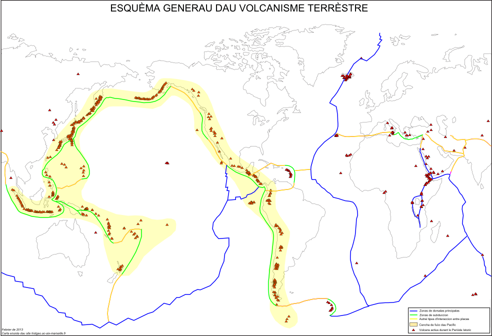 Esquèma generau dau volcanisme terrèstre.